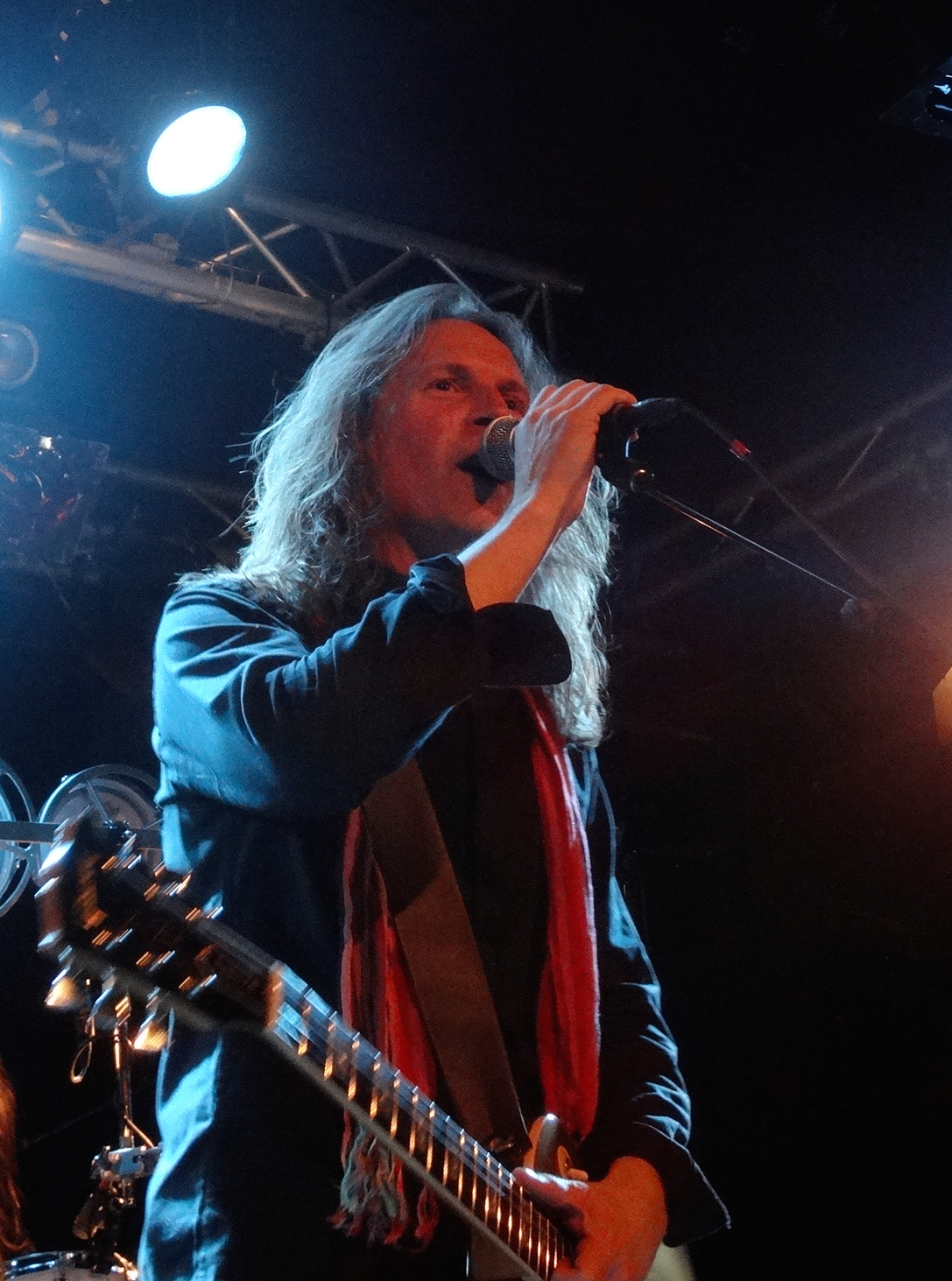 Hasse Fröberg at Katalin, Uppsala May. 09. 2015